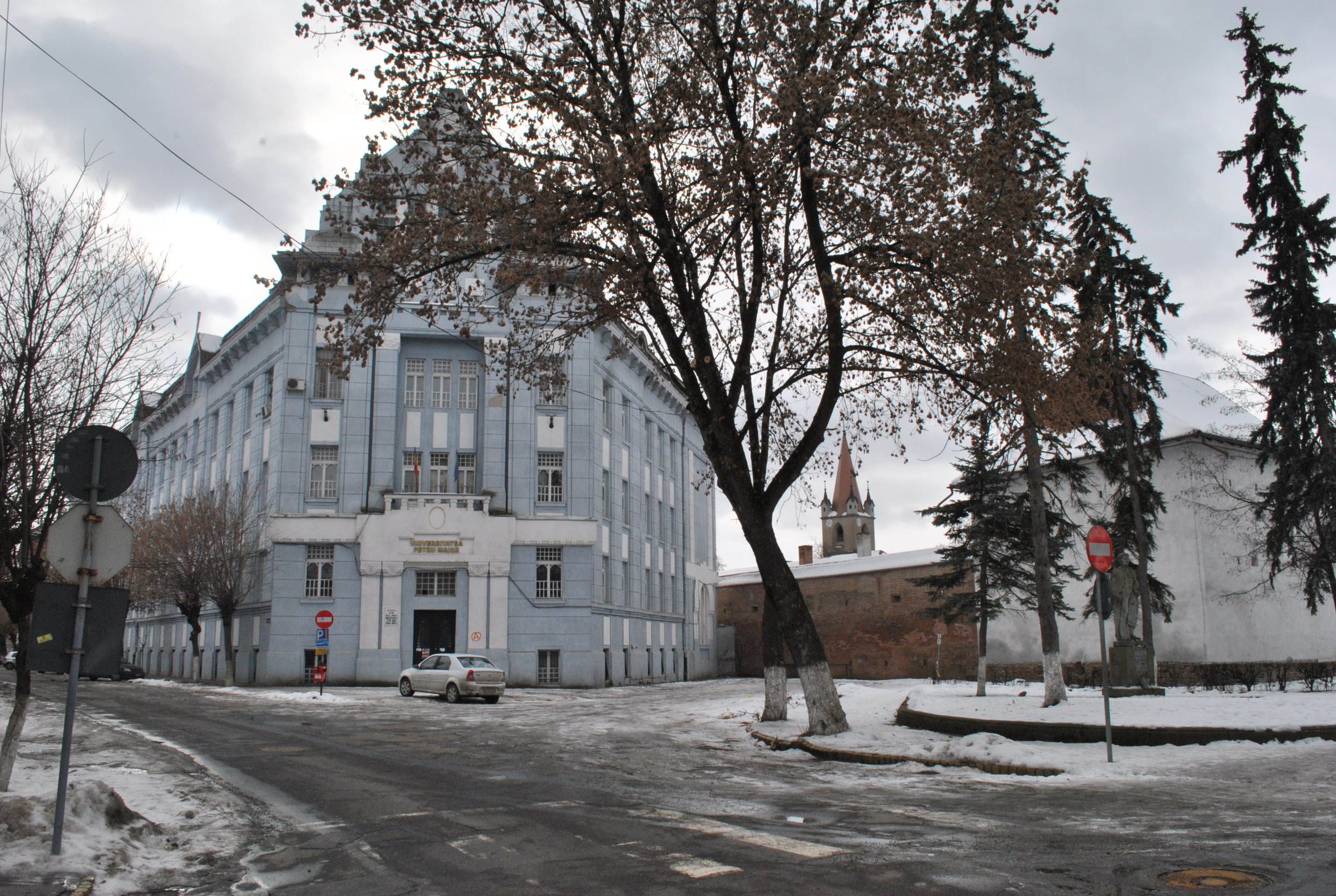 Ansamblul urban "Zona cetății"